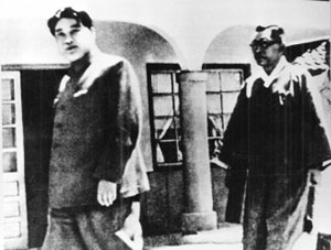 김일성과 김구, 평양 1948.04